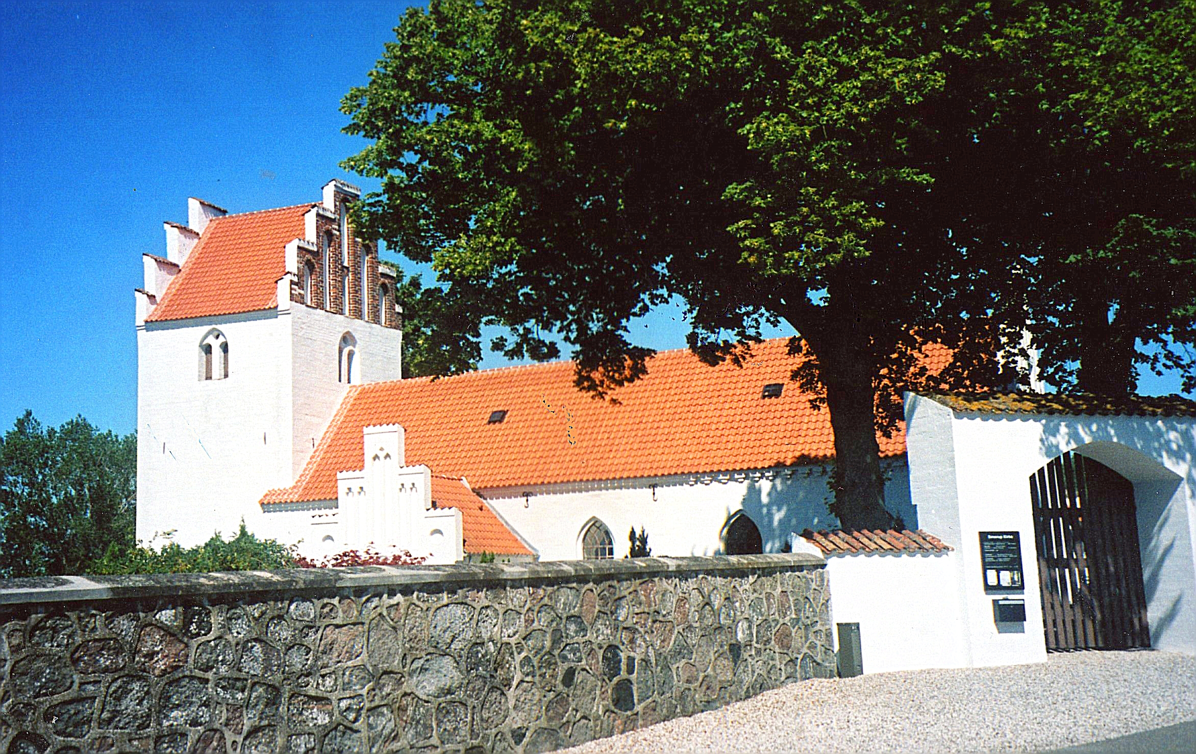 Smerup Kirke, Smerup, Faxe Kommune